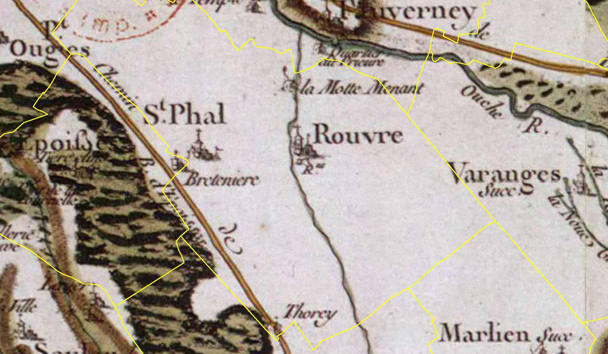 Rouvrescassini.JPG